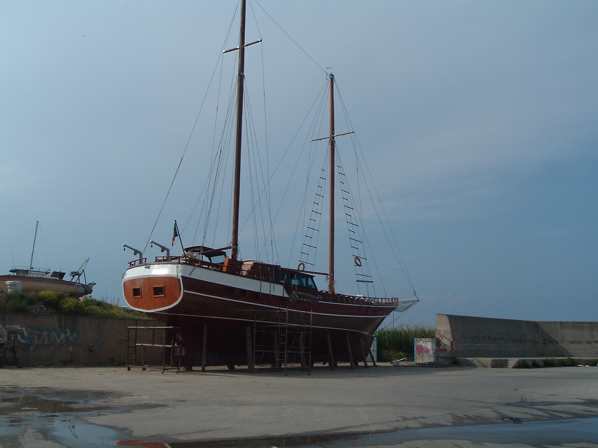 Autore:Ippolito Leonardo (Utente:Vortix); macchina digitale propria; GFDL.